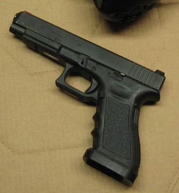 Glock 35 semiautomatic pistol in .40 S&W